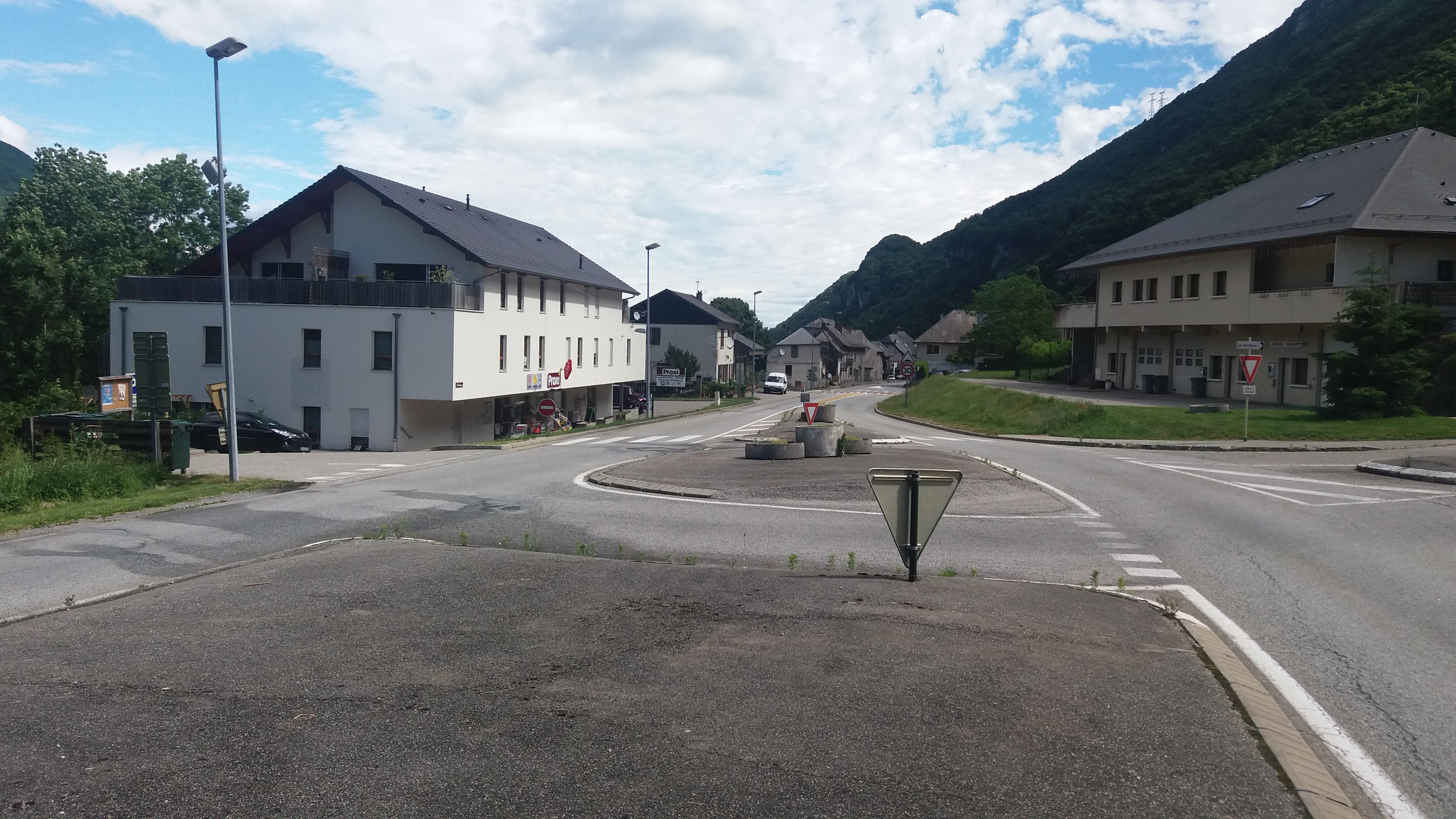 RD 1006 dans Saint-Thibaud-de-Couz. Photo prise le 06.06.2020